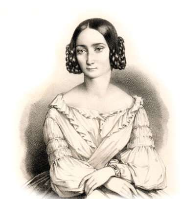 Rosine Stoltz, gravure du XIXe siècle. Has "Leia" hairstyle...